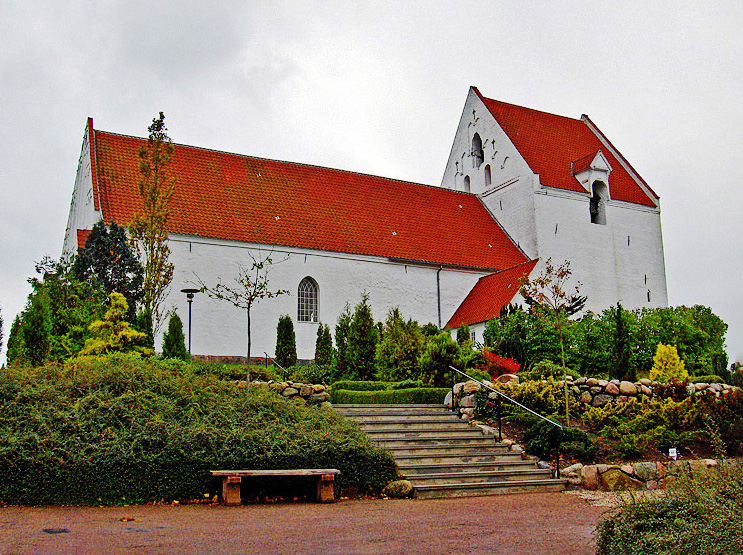 fra nordøst